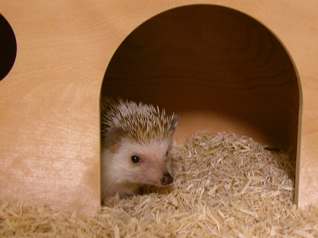 HedgehogA Yawn of My Hedgehog (1)